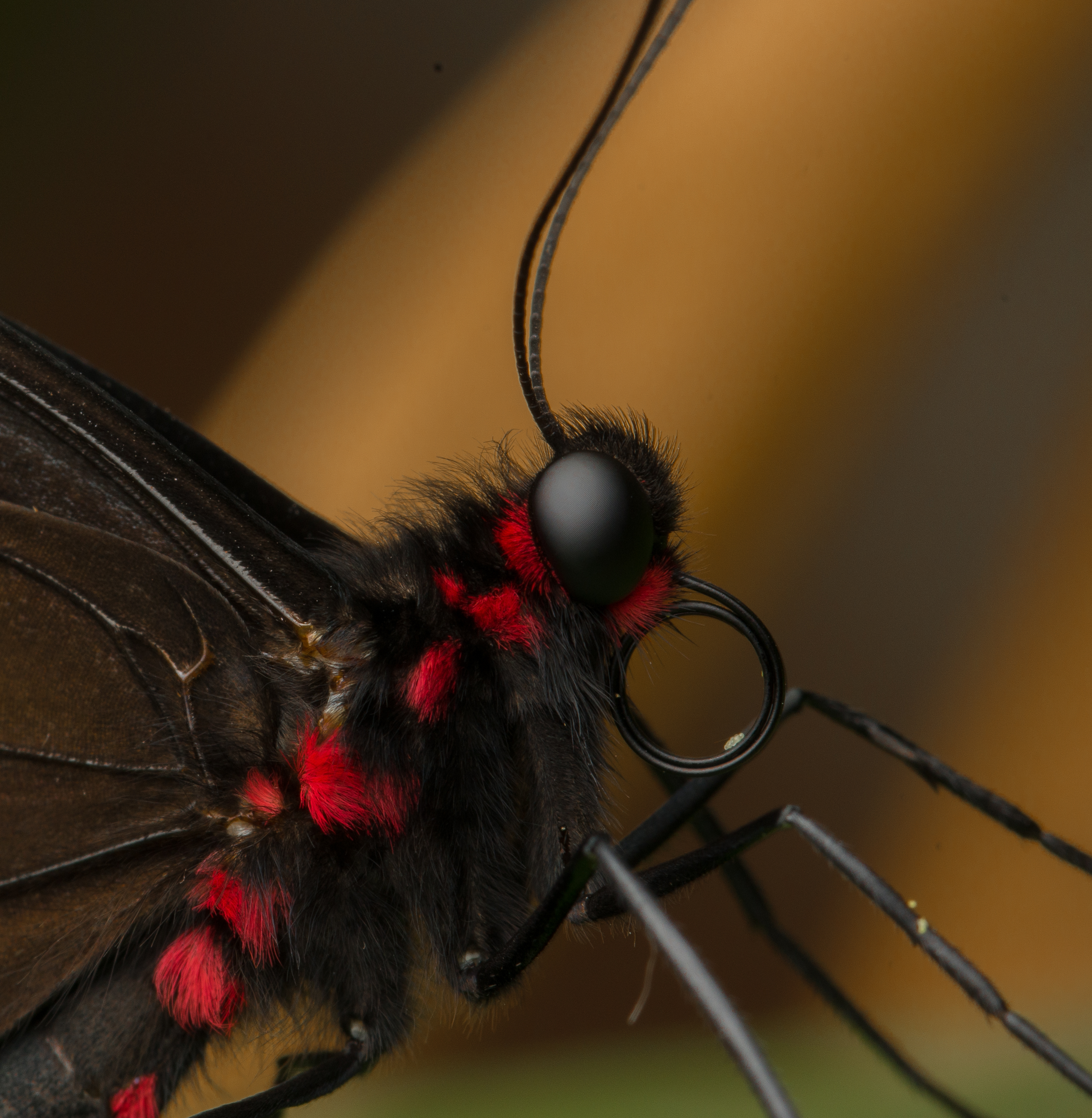 Butterfly Gardens